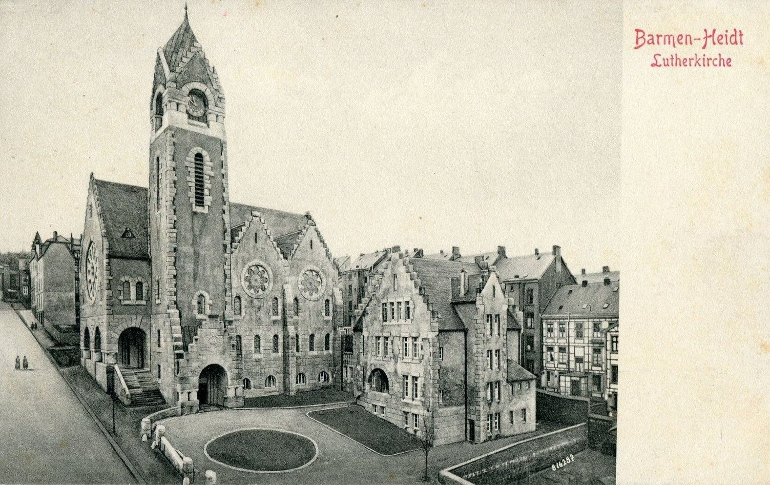 evangelisch-lutherische Lutherkirche in Wuppertal-Barmen-Heidt, Obere Sehlhofstraße; erbaut 1909-1911 nach Entwurf von Wilhelm Werdelmann)